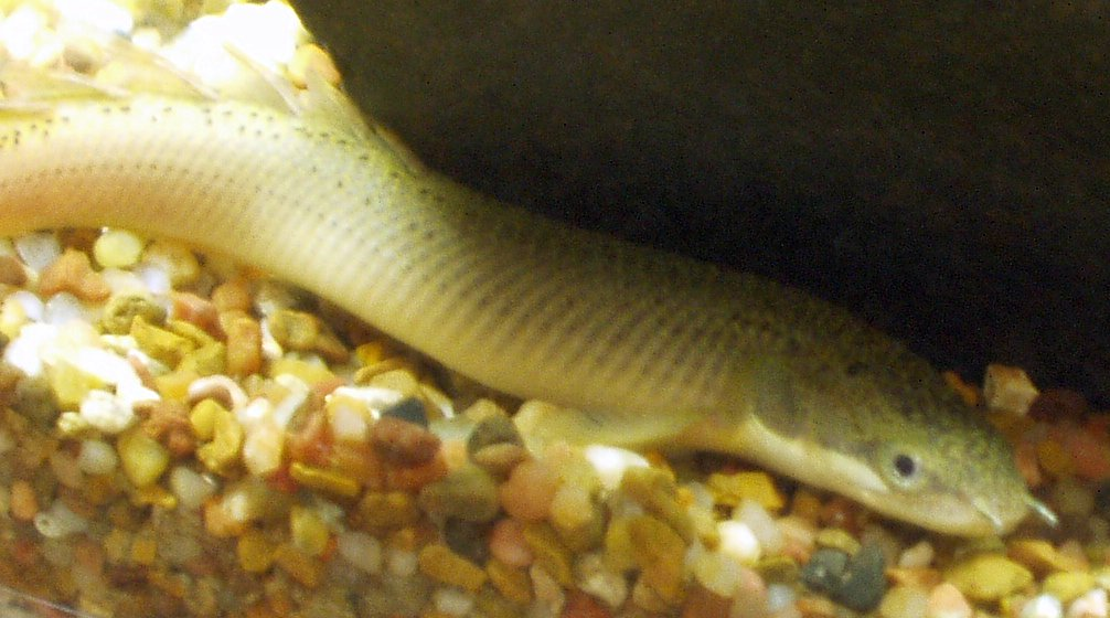 Polypterus senegalus senegalus. Juvenile bichir in an aquarium